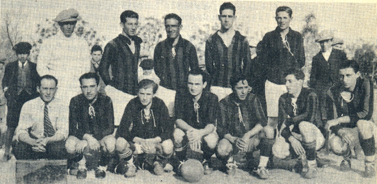 Equipo que se consagró campeón invicto del torneo 1926 de la Liga Paranaense de Futbol. Parados: Floreán, Zalazar, Saucedo, Ferreyra y Gaggión. Agachados: Calderón Hernandez, Dapit, Monti, Alegre, Casalongue y González.